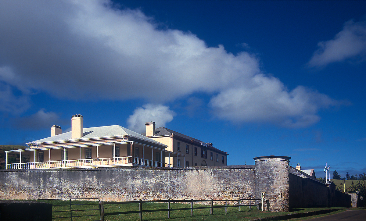 Norfolk Island jail.